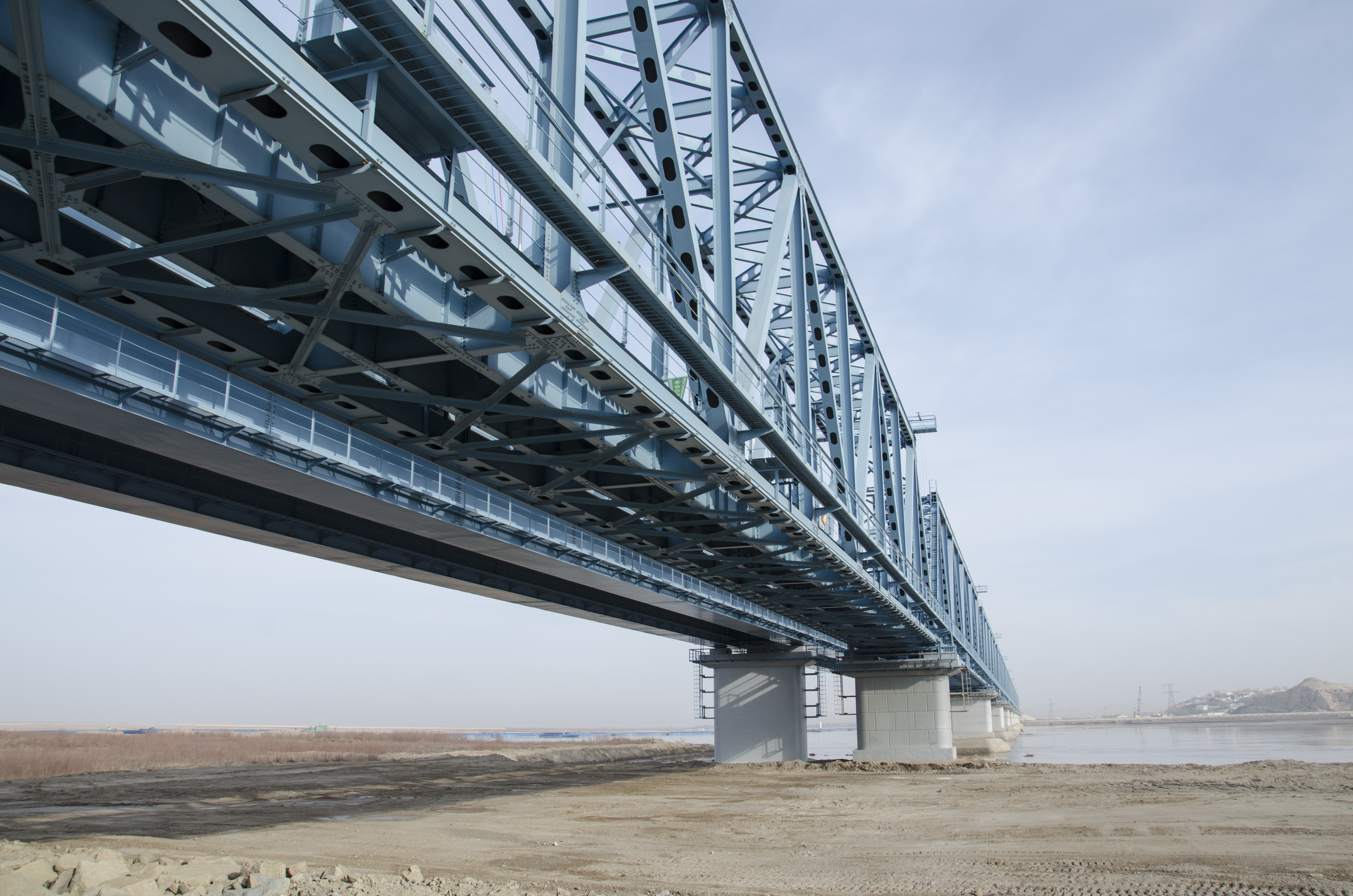 Автодорожный мост между городами Атамурат и Киркичи (Туркменистан)